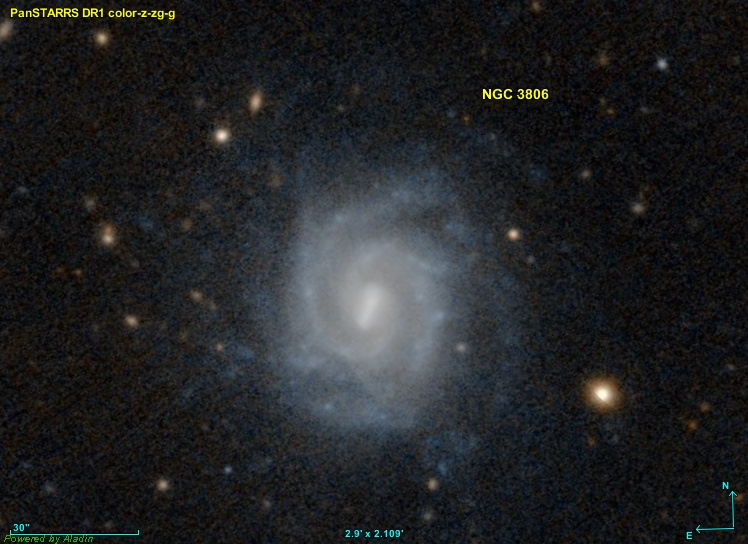 Crée avec Aladin et les données PanSTARRS